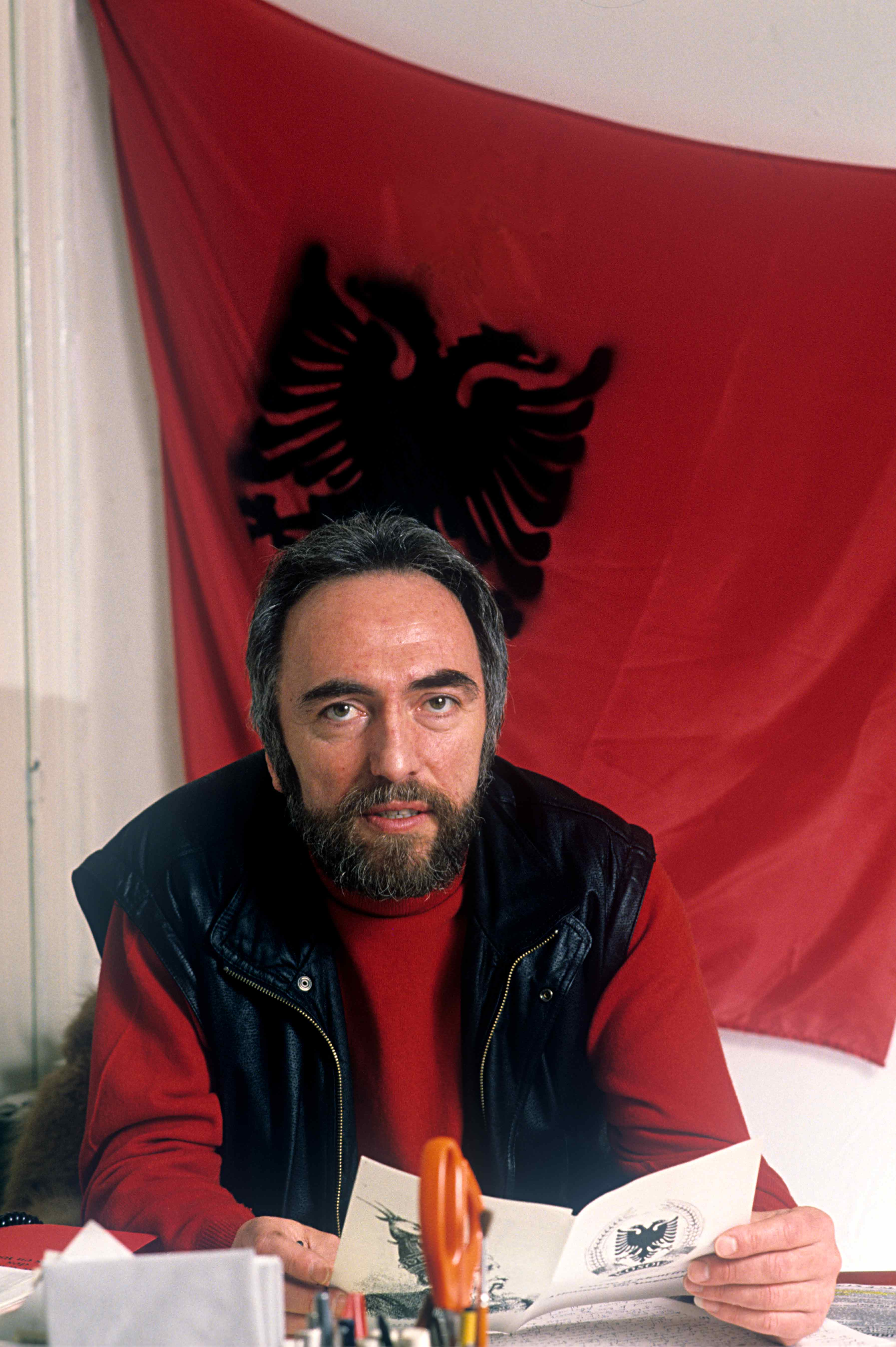 Enver Hadri në zyrë